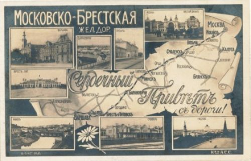 Музей: Баранавіцкі краязнаўчы музей Тып: выяўленчыя крыніцы Від: графіка прыкладная Прадметнае імя: паштоўка Назва/аўтарская назва: "Московско-Брестская жел. дорога. Сердечный Привѣтъ съ дороги!" Калектыўныя аўтары: Выдавец - Суворын А.С.; Матэрыялы: папера; Тэхналогіі стварэння: друк двухколерны; Дата стварэння: 1910-1912 гг. Месца стварэння: Расійская Імперыя Памеры: 8,6х13,5 см